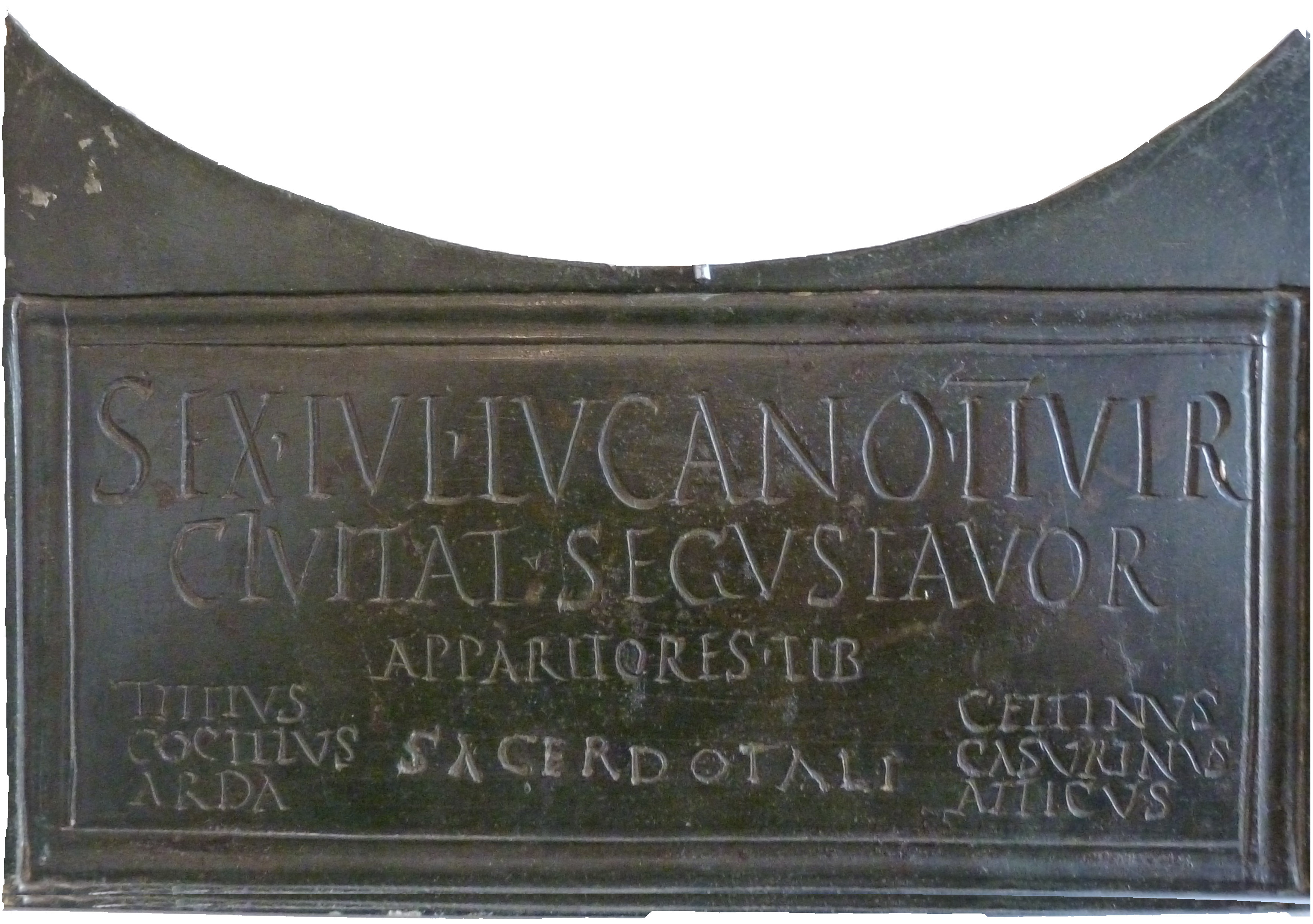 Plaque funéraire trouvé à Tassin